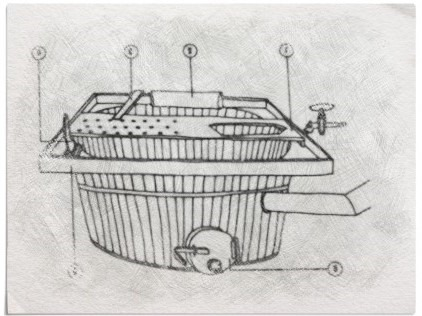 1. Planche, 2. Chaise, 3. Planchette, 4. Egouttadou (perroquet | rossignol), 5. Garniture, 6. Pistolet